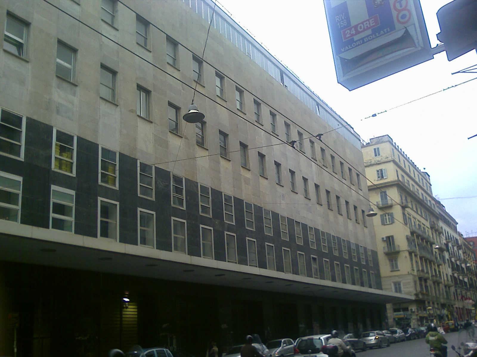 Palazzo delle Poste: Lateral facade